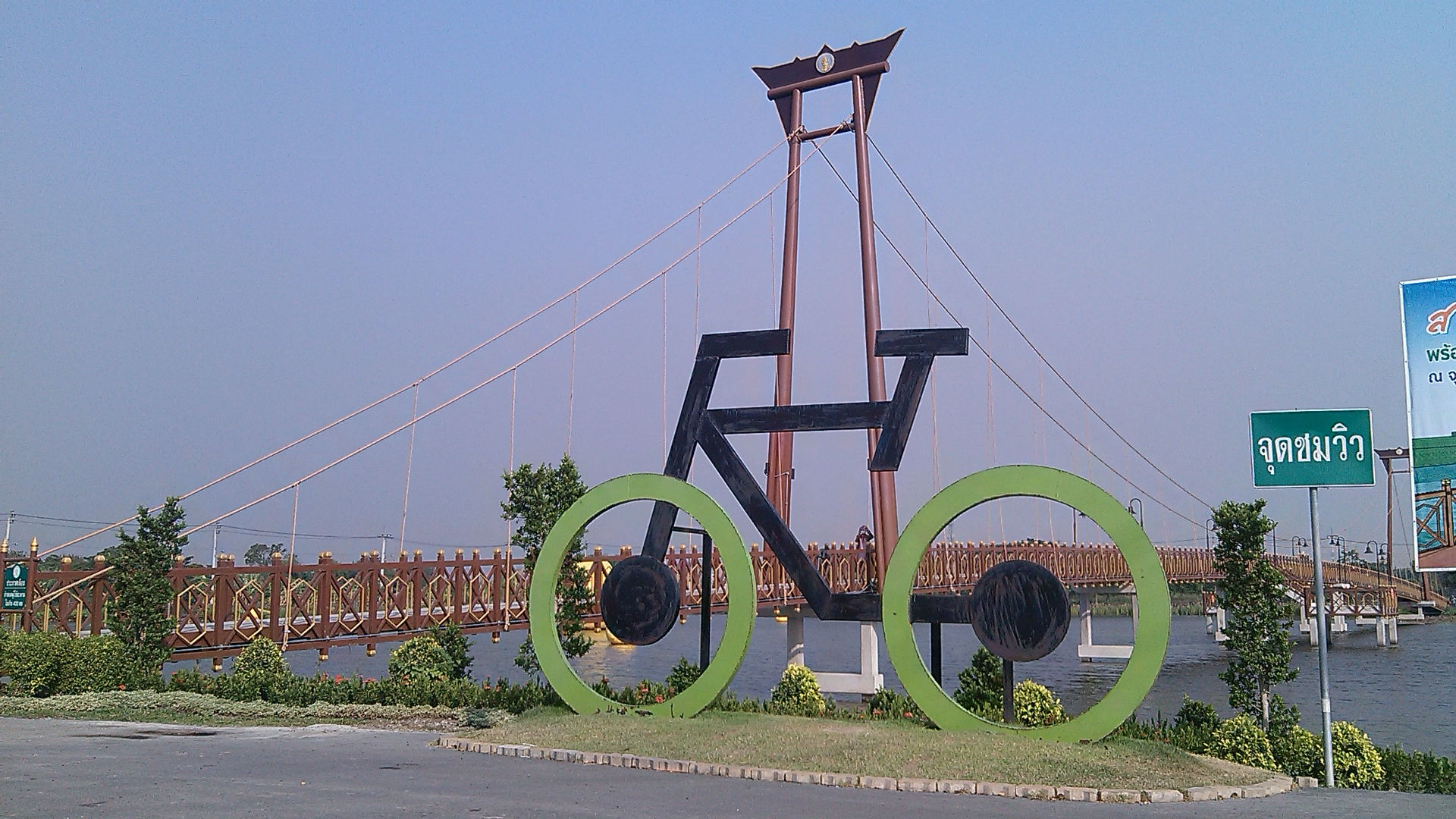 Sai Kong Din Tai, Khlong Sam Wa, Bangkok 10510, Thailand